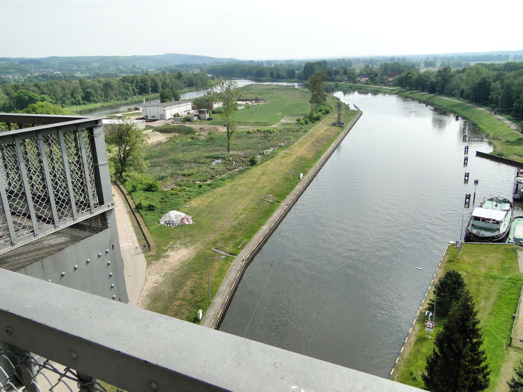 Podnośnia statków w Niederfinow (Niemcy)